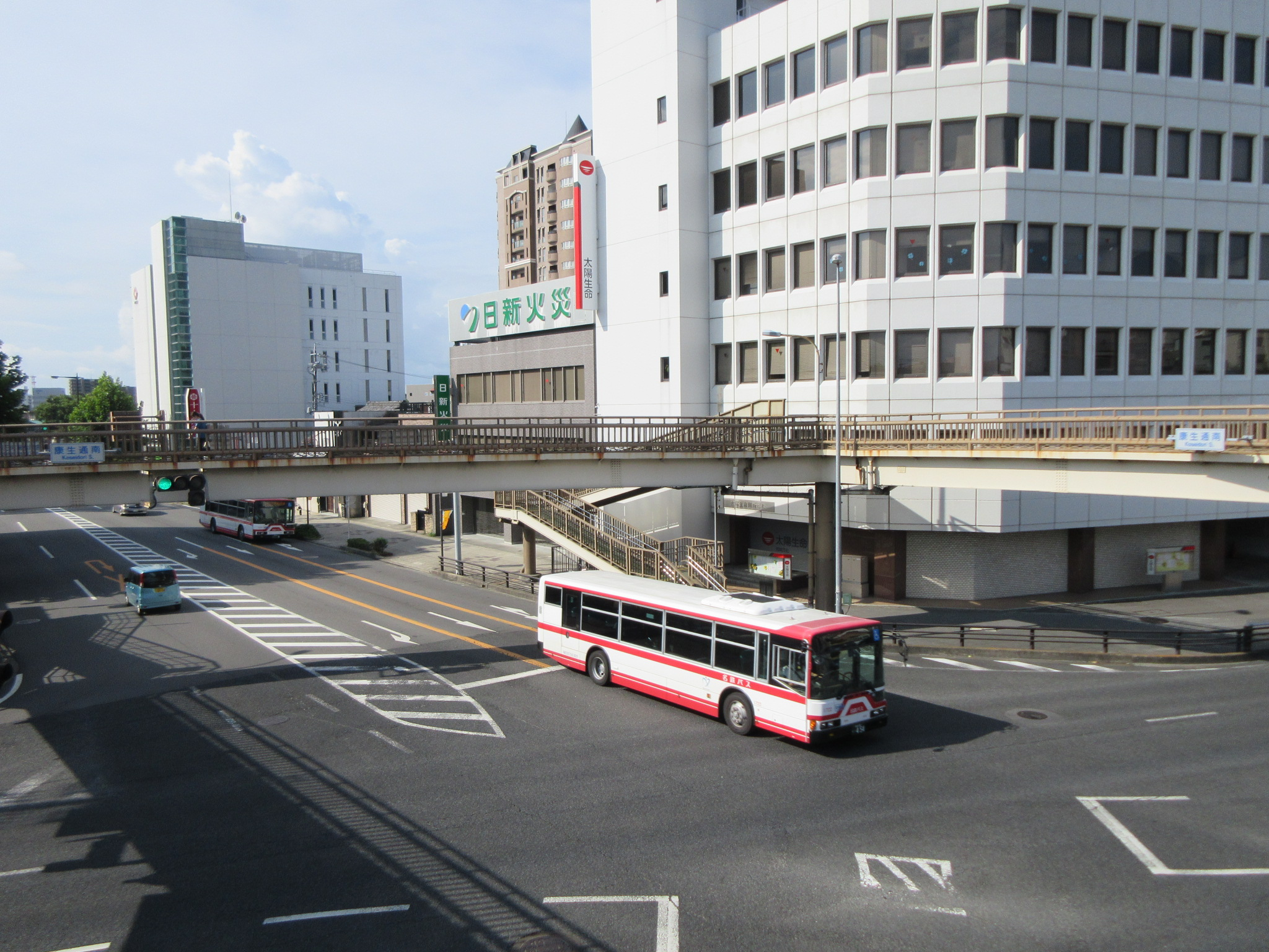 愛知県道483号岡崎幸田線。岡崎市康生通南2丁目の起点。